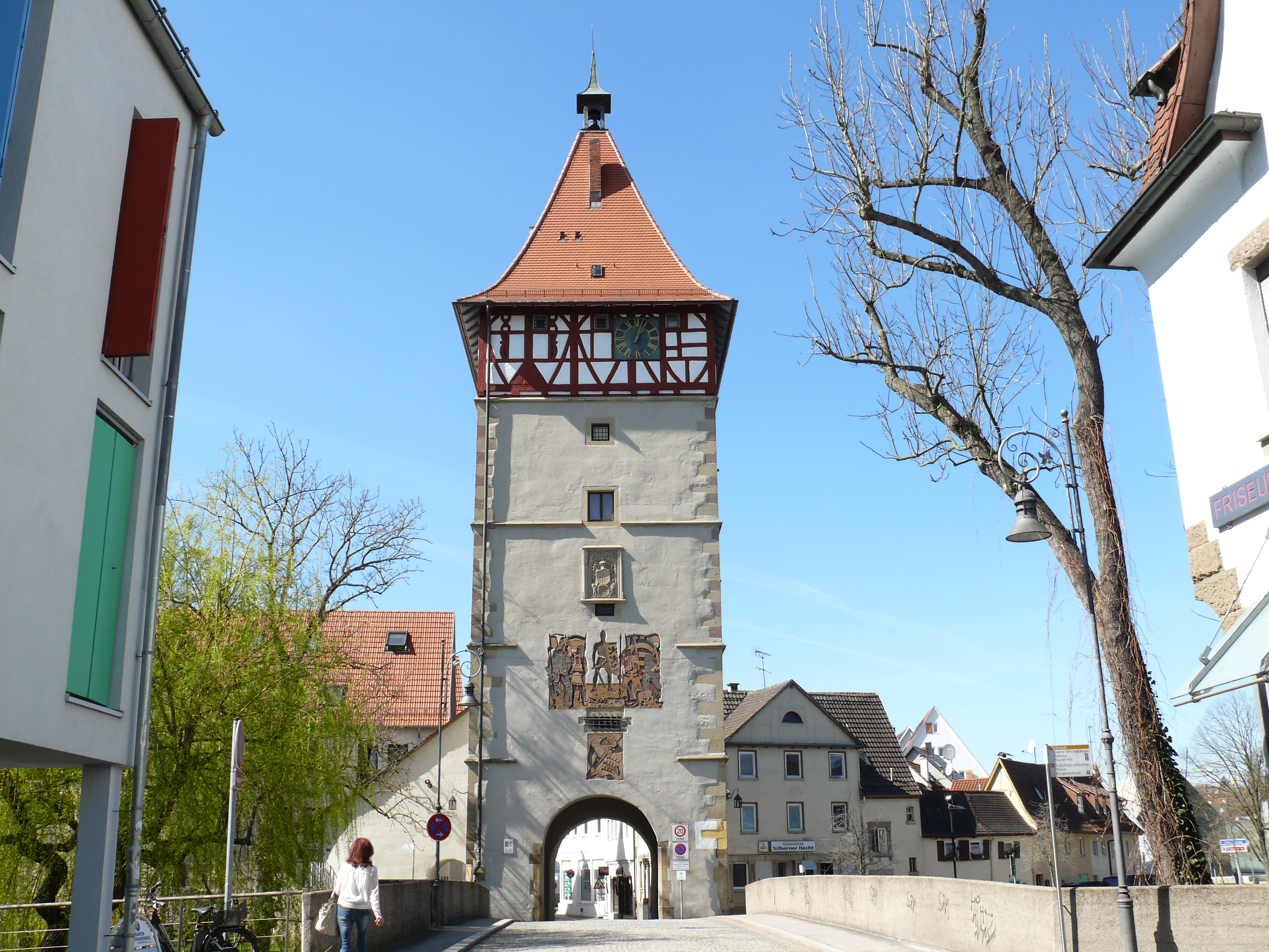 Der Beinsteiner Torturm in Waiblingen. Blick von Osten Richtung historischer Altstadt.